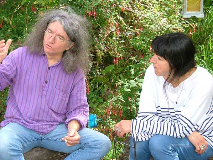 Bernez Tangi asambles gant Olwenn.